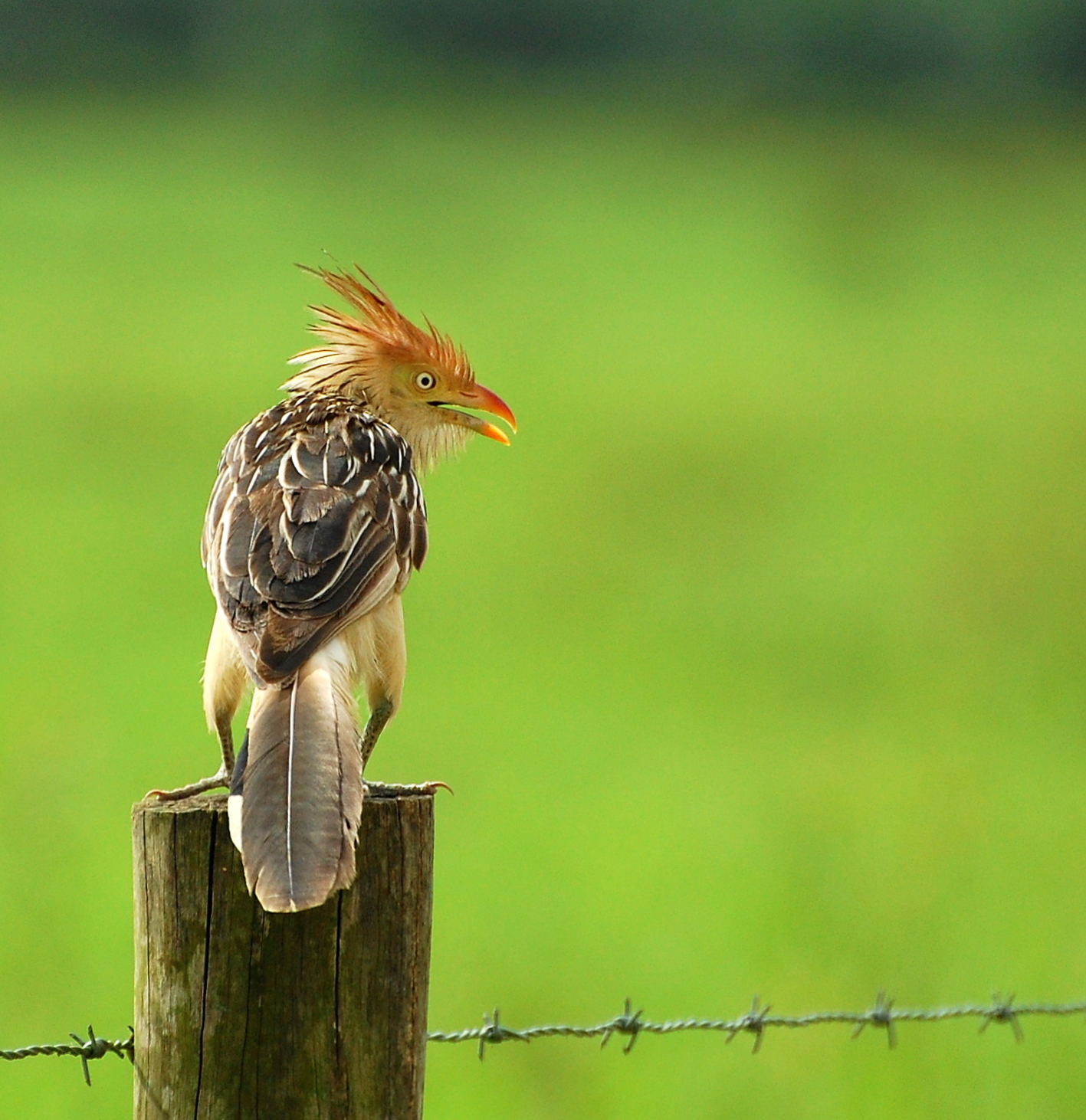 Vale do Ribeira